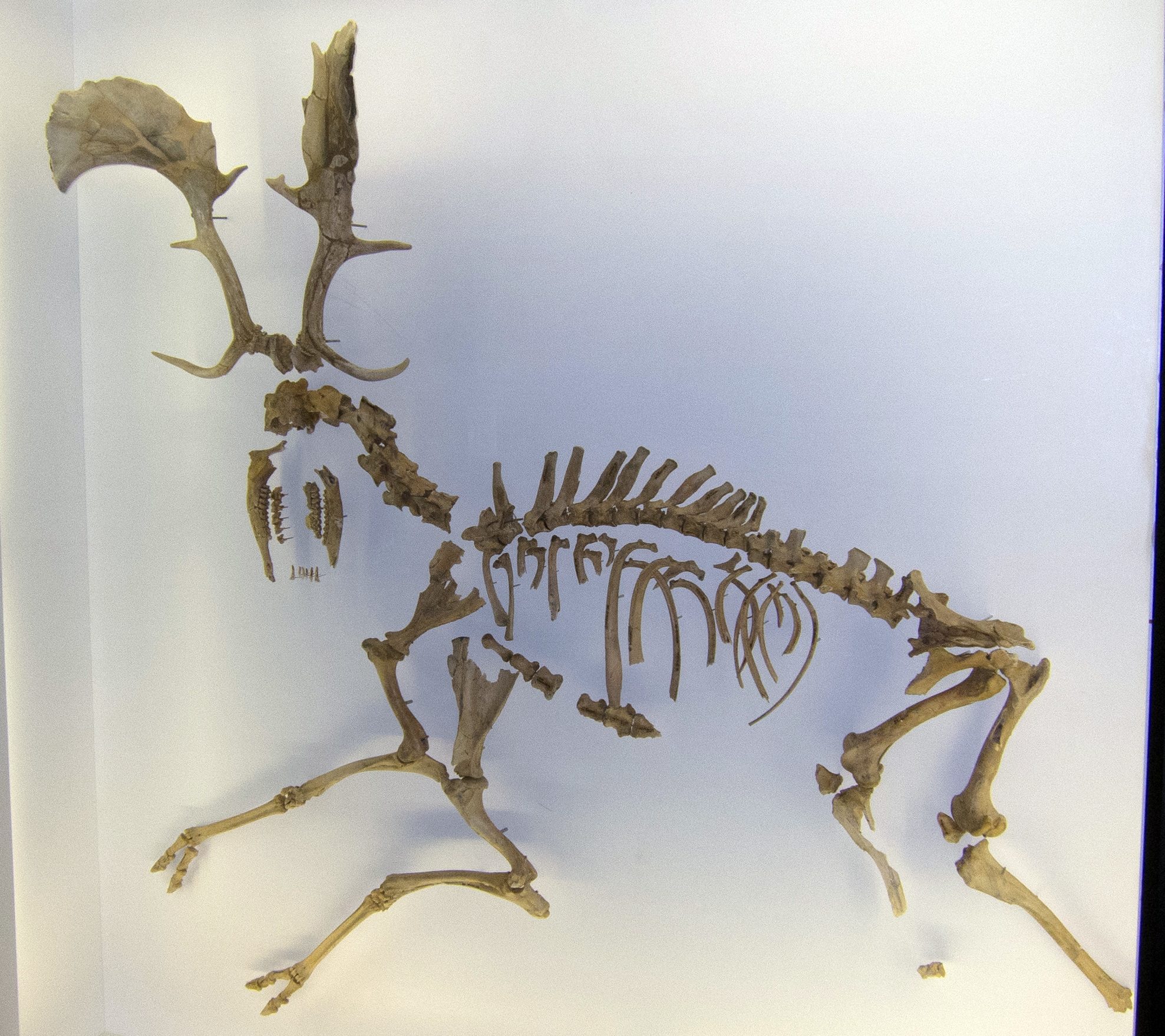 Berlin 2012